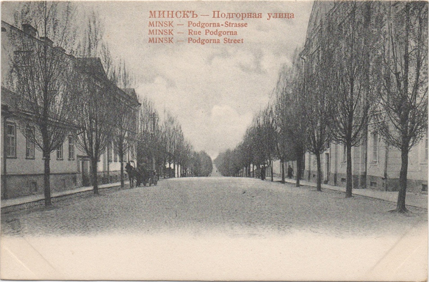 Беларуская (тарашкевіца): Менск (Miensk), вуліца Падгорная (vulica Padhornaja)